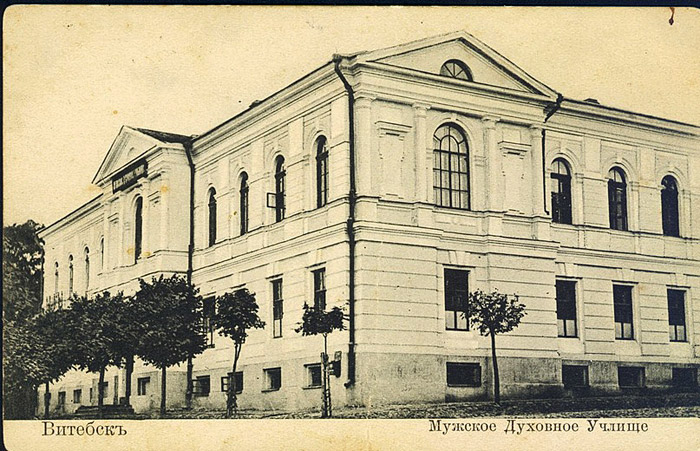 Віцебскае мужчынскае духоўнае вучылішча